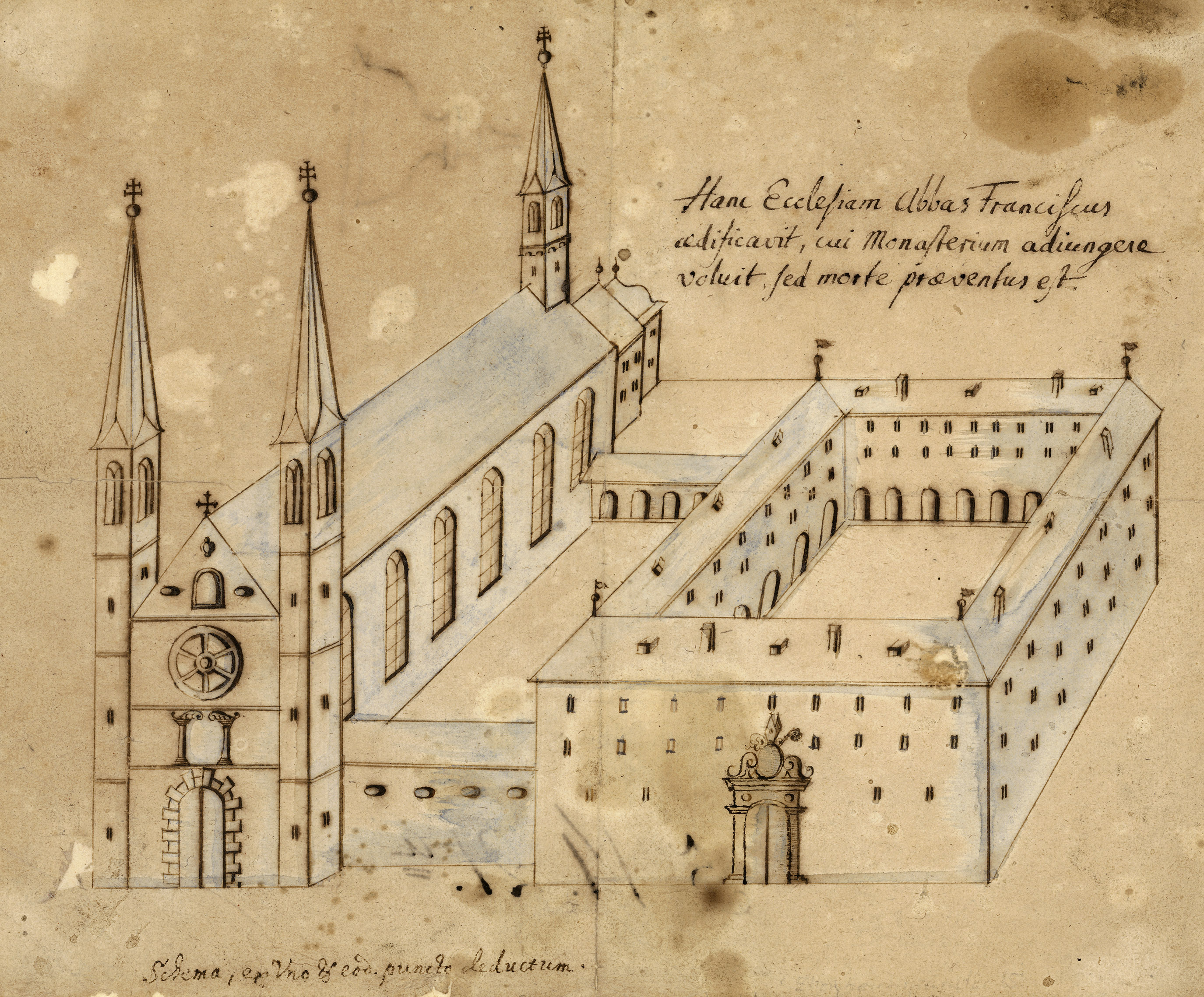 Kloster Ettenheimmünster, um 1683 (GLAK G Ettenheimmünster 15)